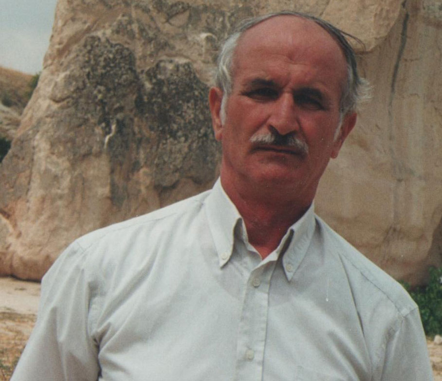 Asım Tanış Kapadokya'da